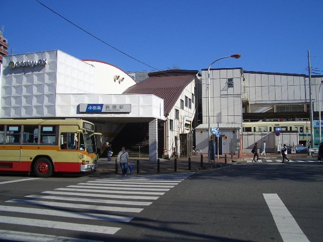 Chōgo Station West Exit, on the Odakyu Enoshima Line, Fujisawa, Kanagawa 長後駅